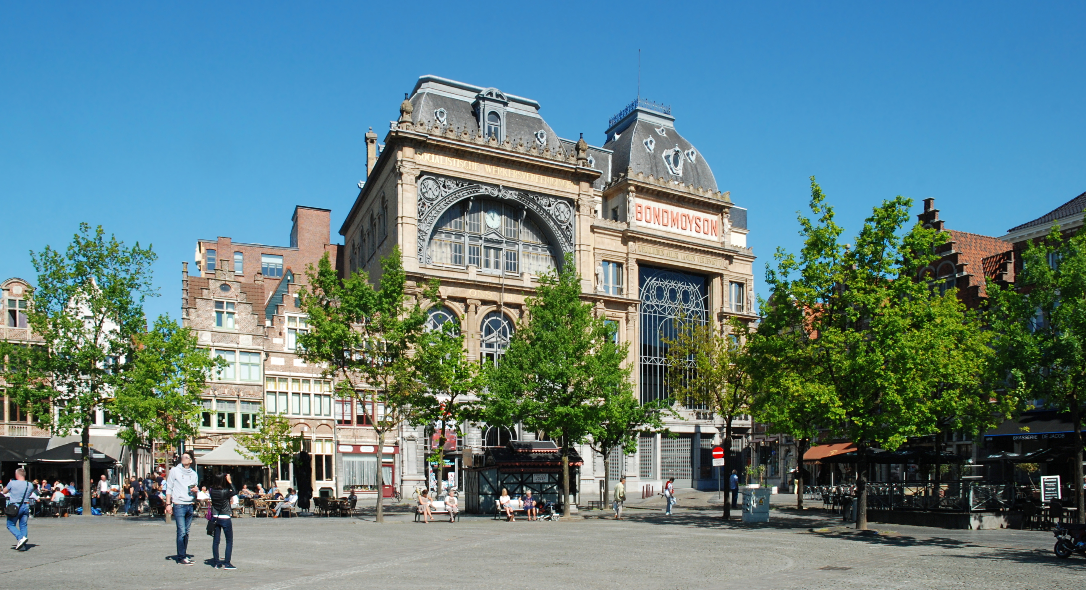 Belgique - Gand - Maison du peuple Ons Huis et Bond Moyson - Vrijdagmarkt 9-10 (éclectisme, architecte Ferdinand Dierkens, 1899-1902) This photo of immovable heritage has been taken in the Flemish Region